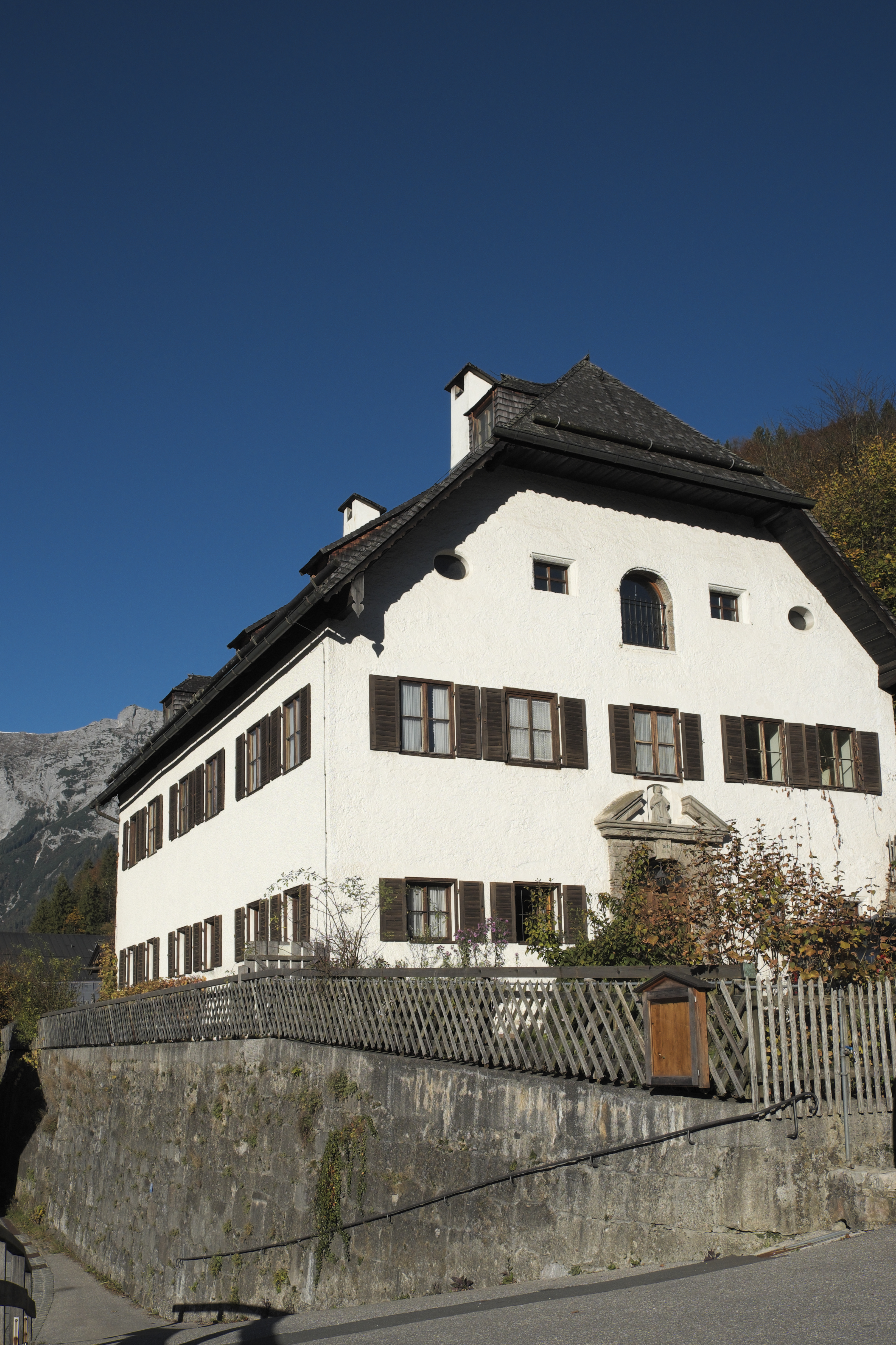 Pfarrhof in Ramsau bei Berchtesgaden im Landkreis Berchtesgadener Land (Bayern/Deutschland)